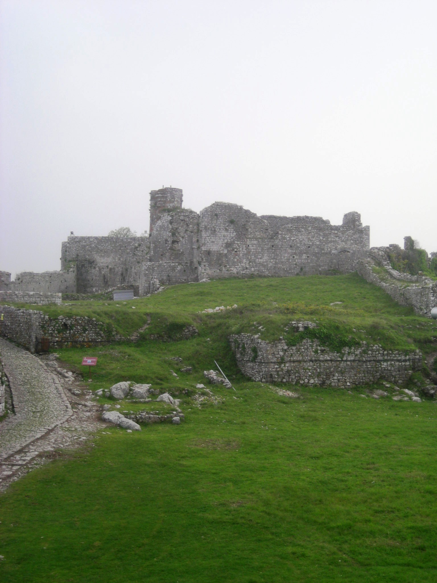 Castillo de Rozafa.